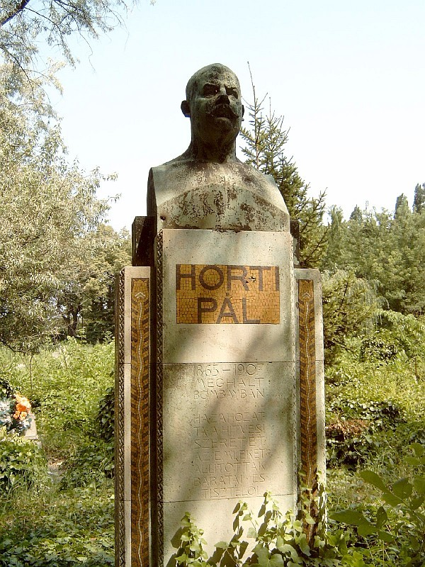 Horti Pál (Pest, 1865. június 18. – Bombay, 1907. május 25.) festő és iparművész sírja Budapesten. Kerepesi temető: 17/3-1-24 [szobrász: Telcs Ede, alapzat: Maróti Géza].